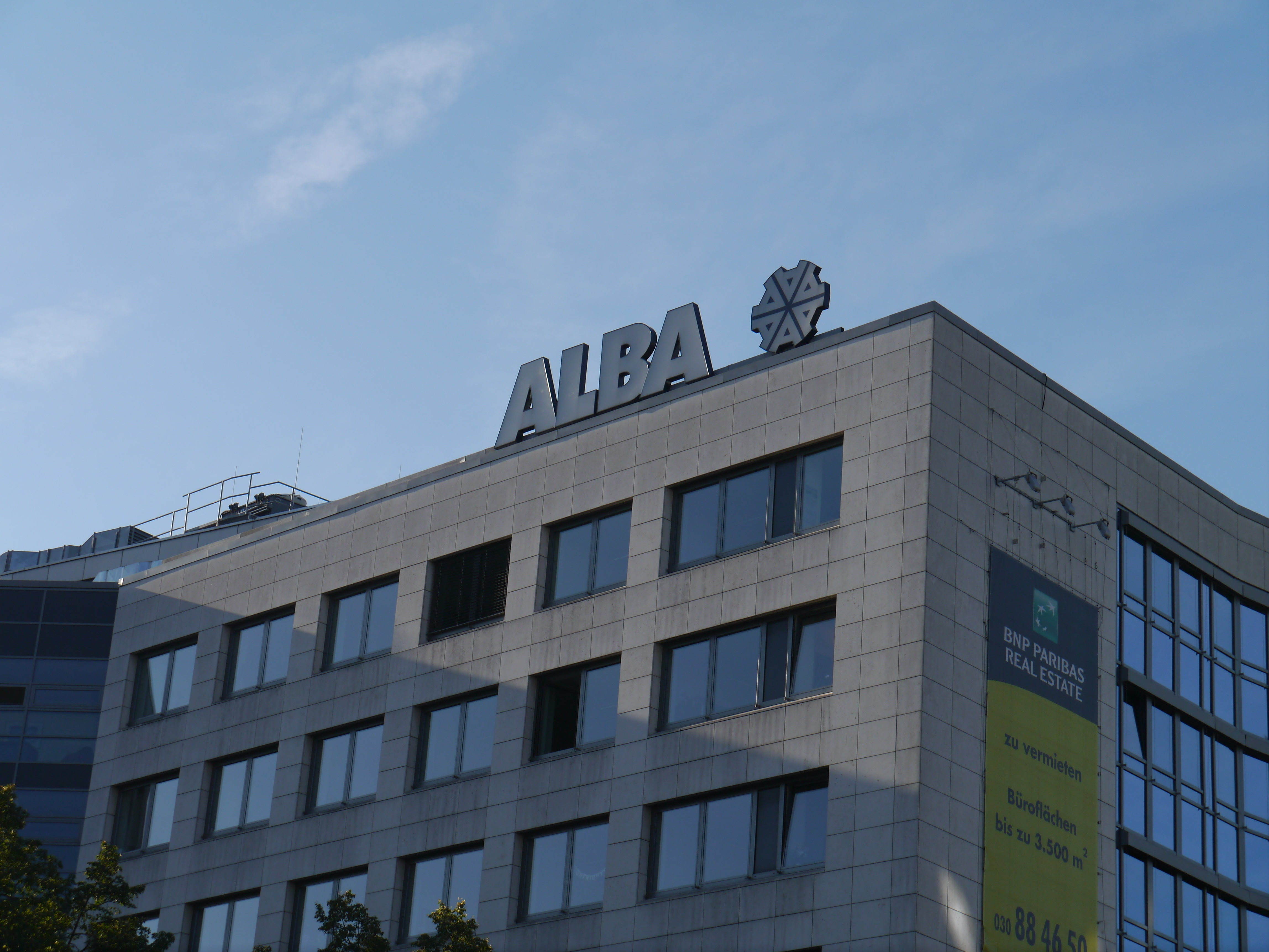 ALBA Group Zentrale, Bismarckstraße